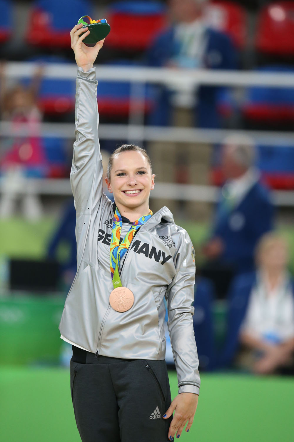 Sophie Scheder, GER, after apparatus final, 2016 Olympic Games; 14/08/2016 - Foto: SCHREYER